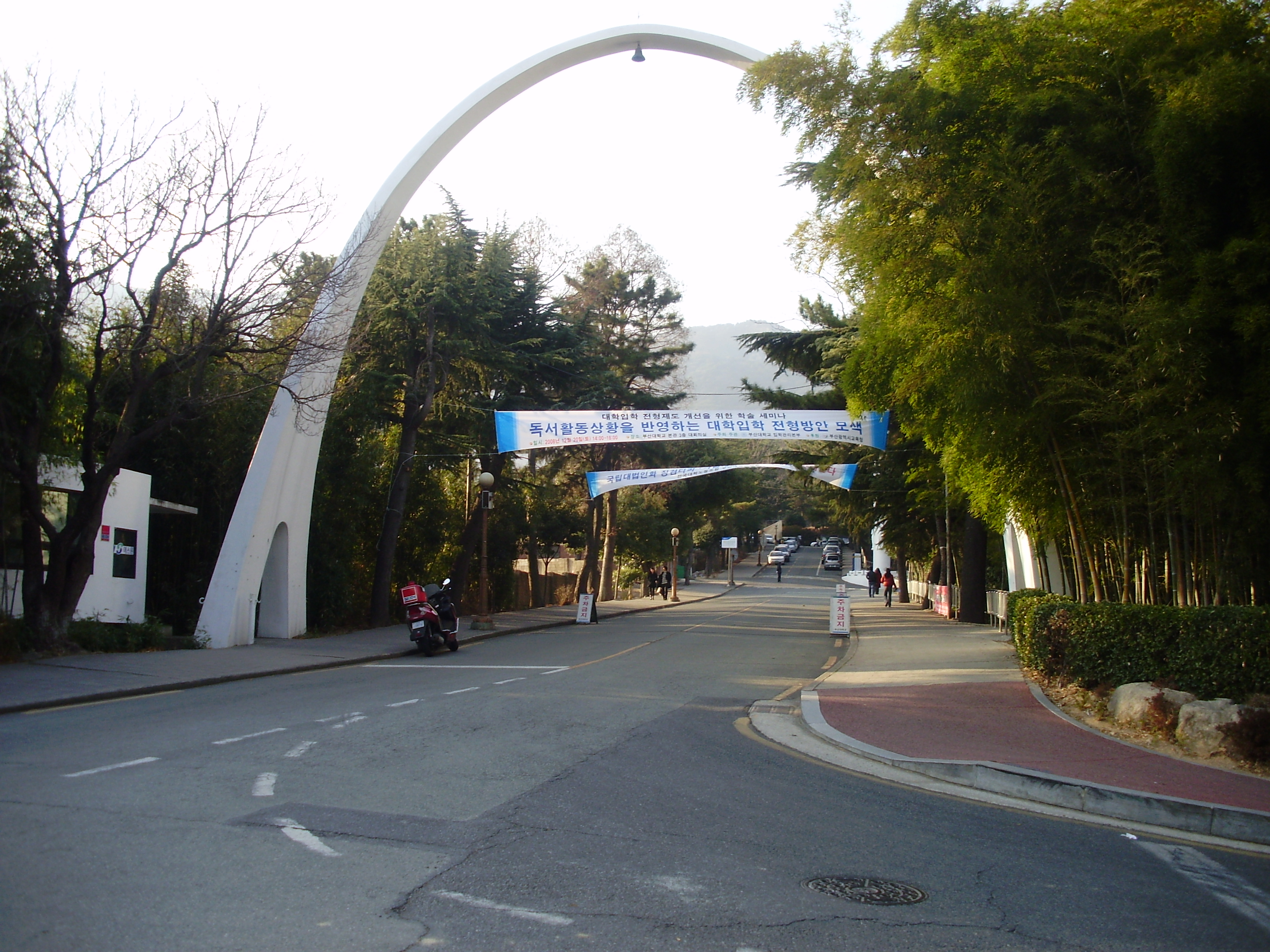 부산대학교 구(舊)정문, 무지개문